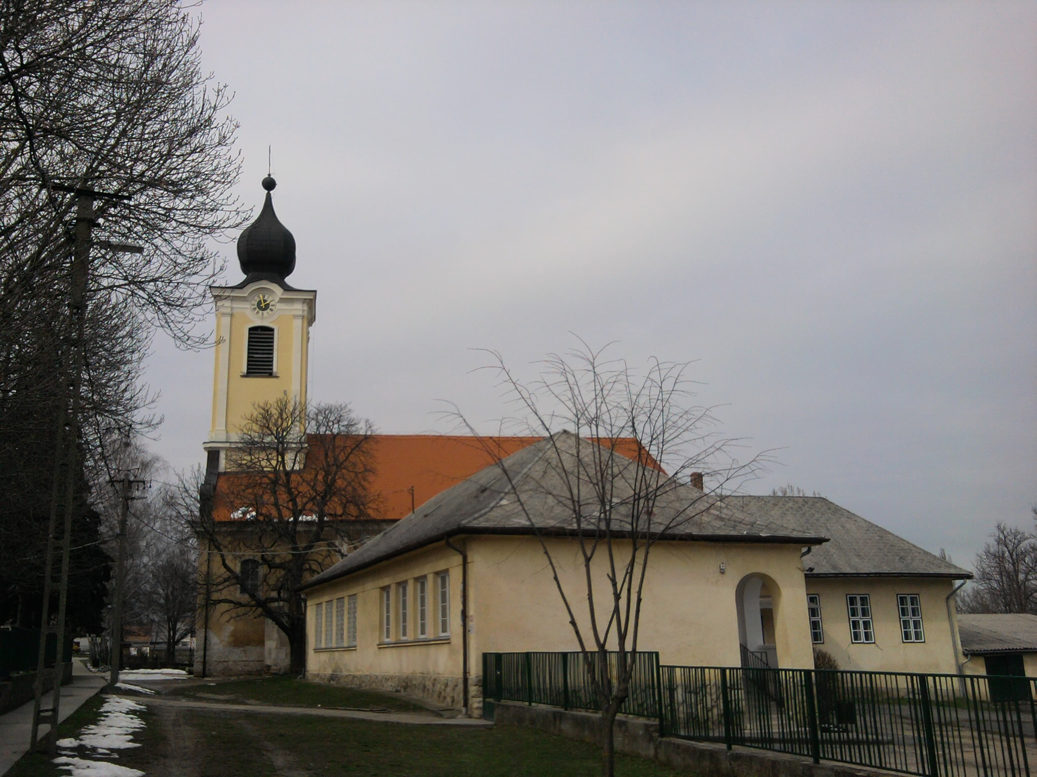 Perbáli iskola és római katolikus templom (Pest megye)